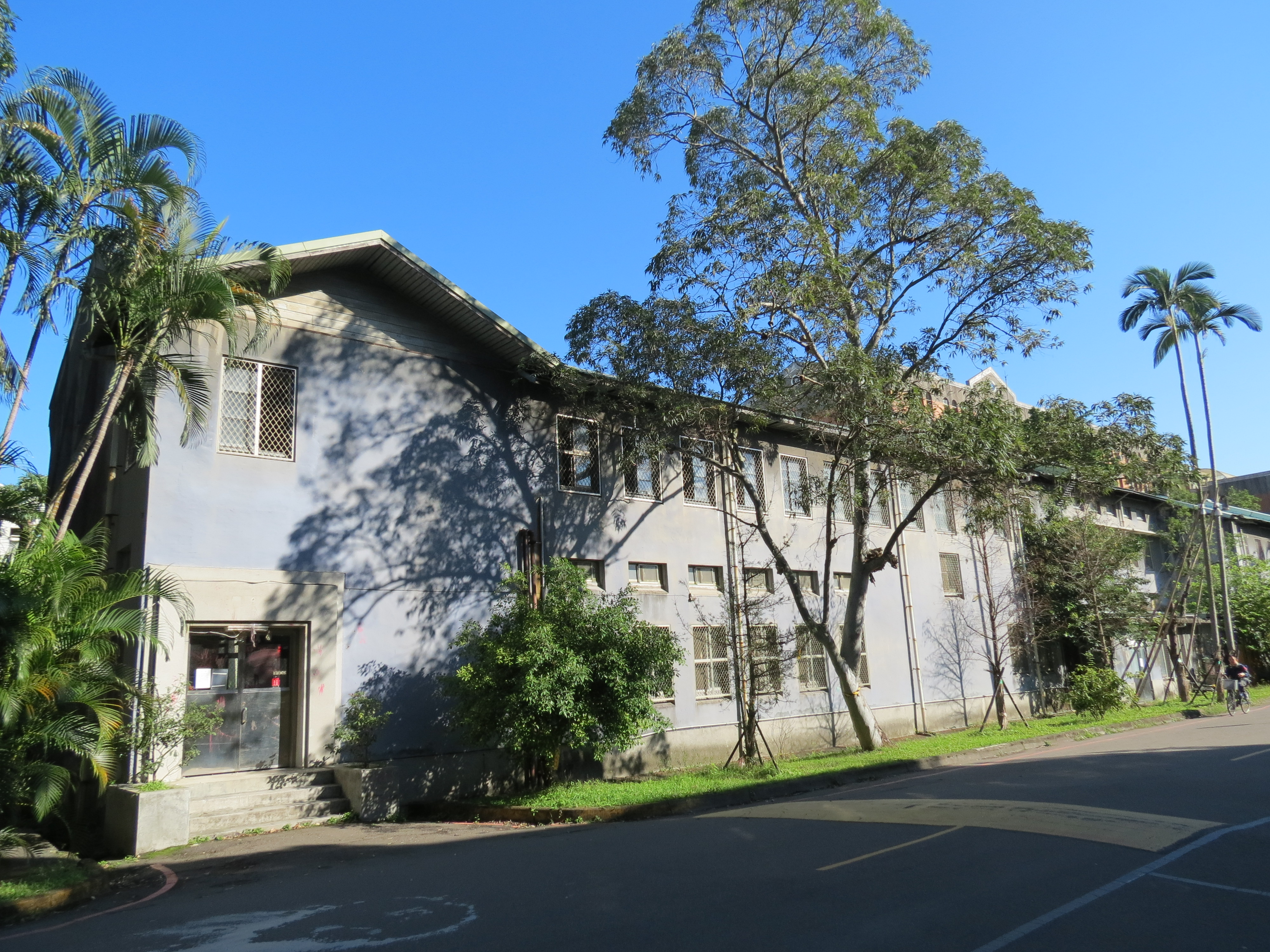 中文（台灣）: 台大舊機全景